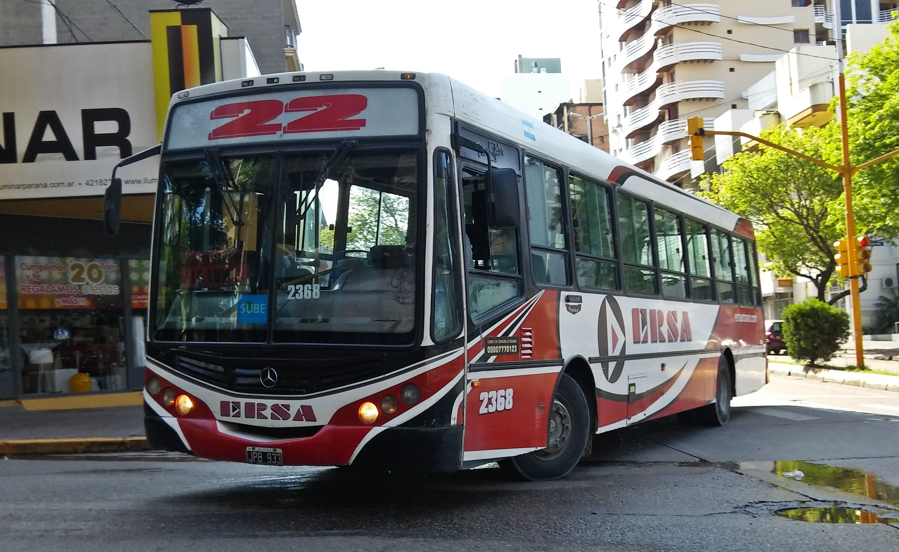 ERSA Urbano Paraná Línea 22 - Interno 2368 Ramal Rojo: Casa de Gobierno - La Loma Metalpar Tronador 2da Generación Mercedes-Benz OF1722-M